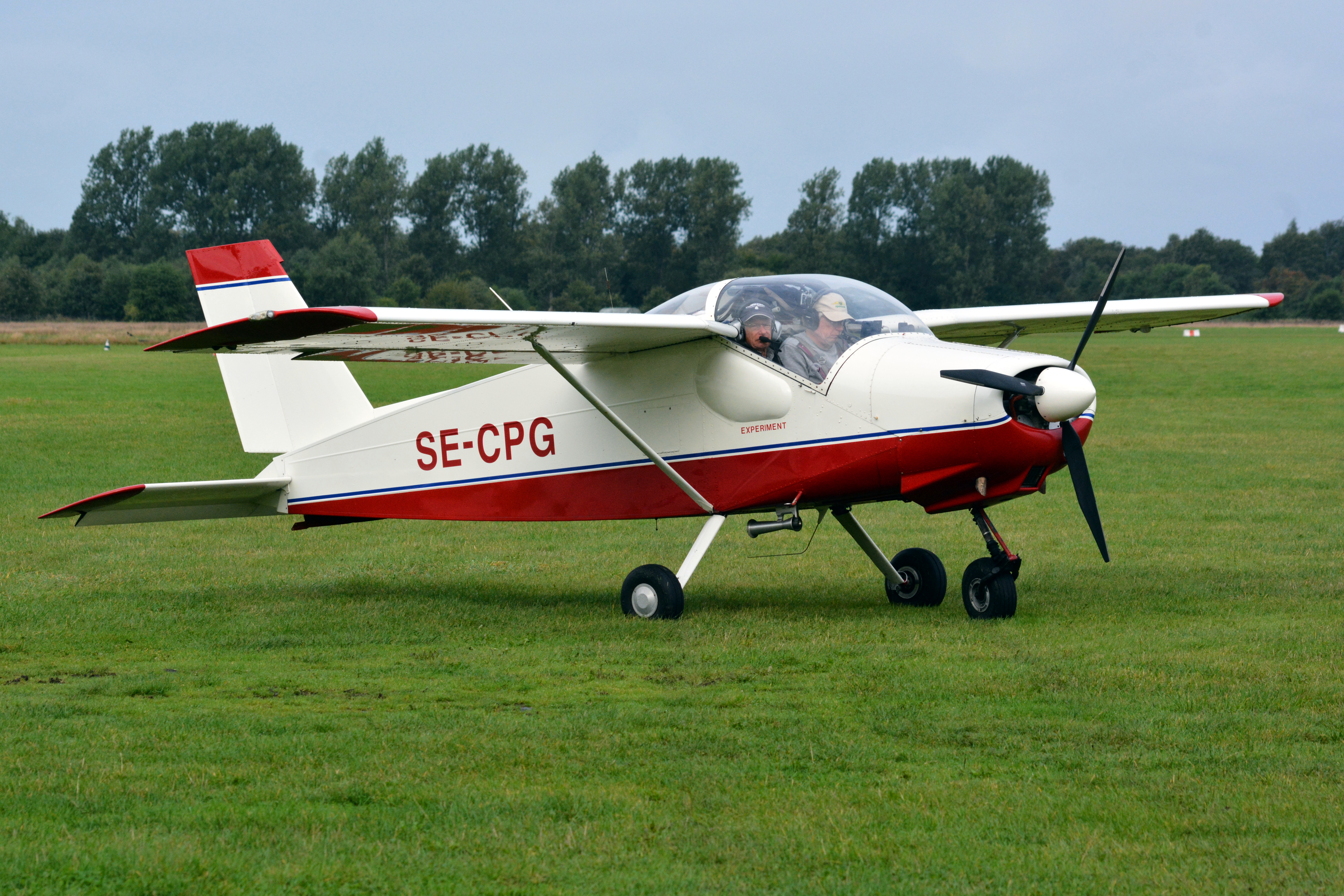 Malmo MFI-9 Junior (SE-CPG) auf dem Flugplatz Uetersen